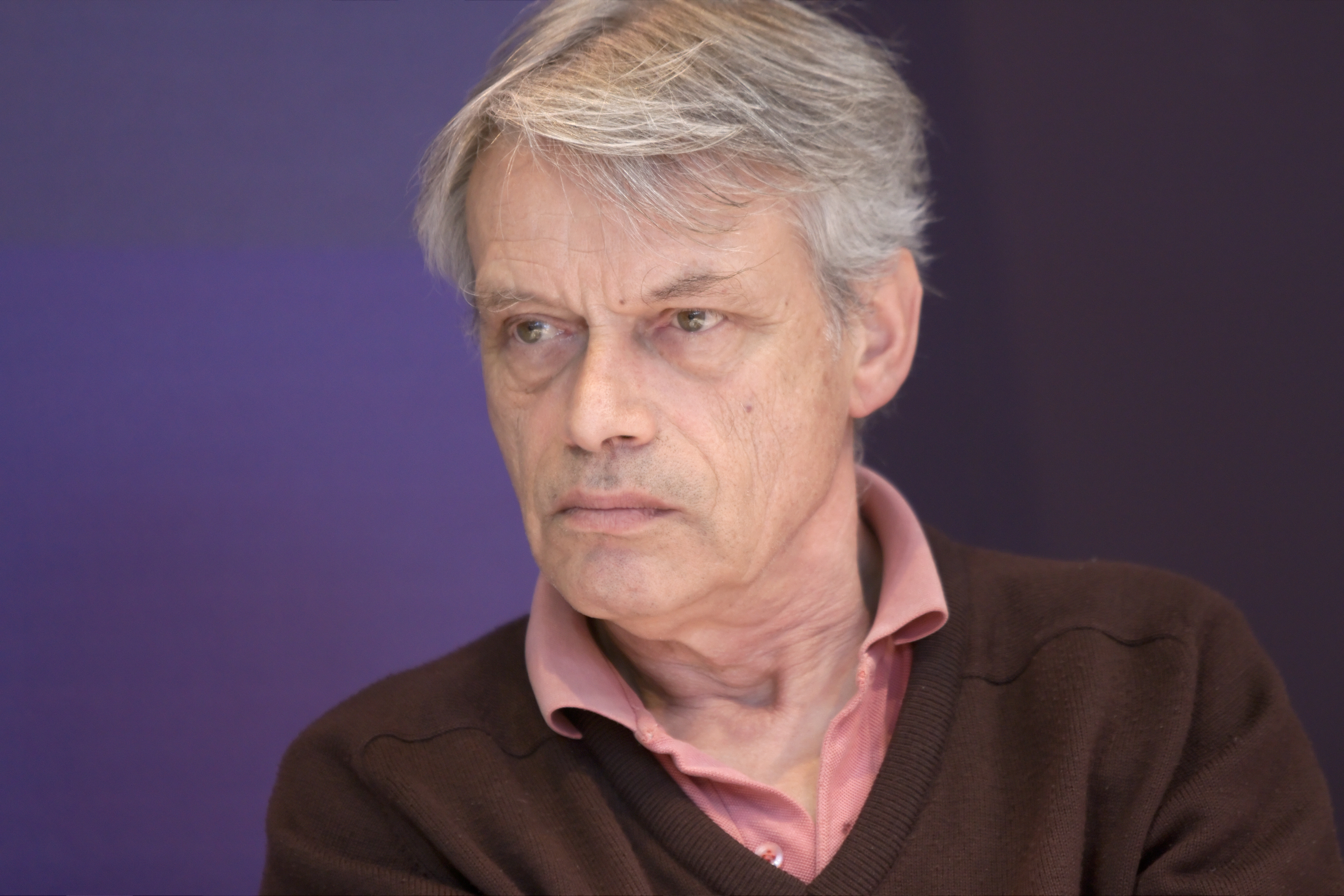 William Cliff au Salon du livre de Paris lors d'une table ronde sur les Territoires littéraires : les Amériques.